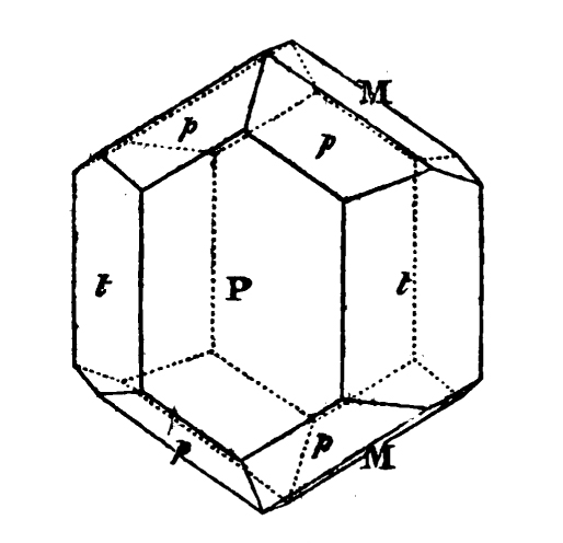 Zeichnung eines Herderitkristalls aus Ehrenfriedersdorf, Sachsen. Eigener Scan einer Kristallzeichnung von Wilhelm Karl von Haidinger (1795-1871) aus dem Philosophical Magazine, or Annals of Chemistry, Mathematics, Astronomy, Natural History, and General Science (1828), Band 4, S. 1.